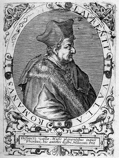 Lorenzo Valla, humanist